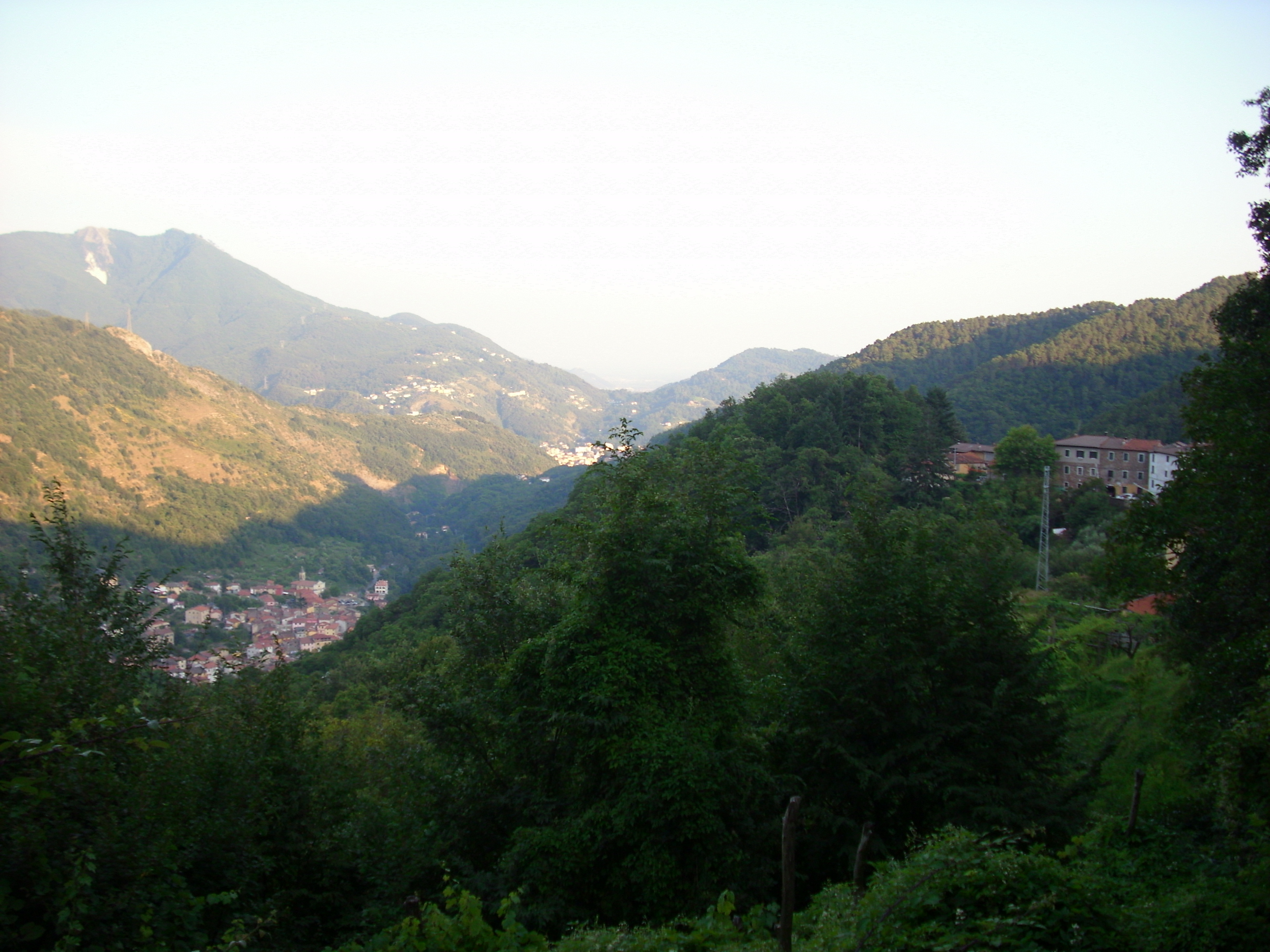 view panorama